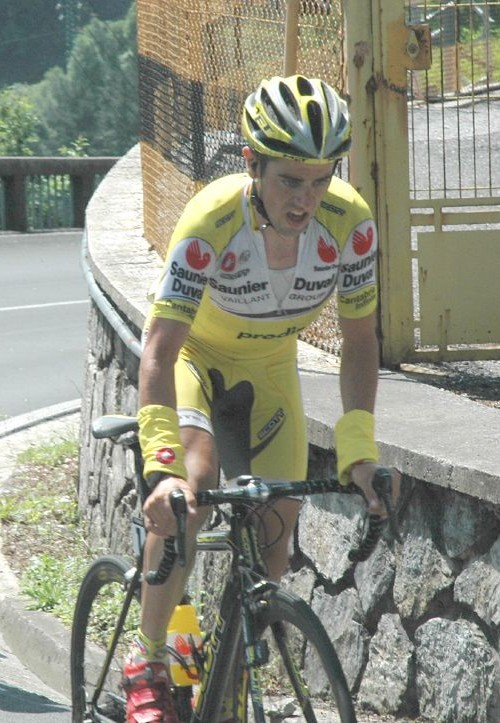 Javier Mejías (Euskal Bizikleta 207)